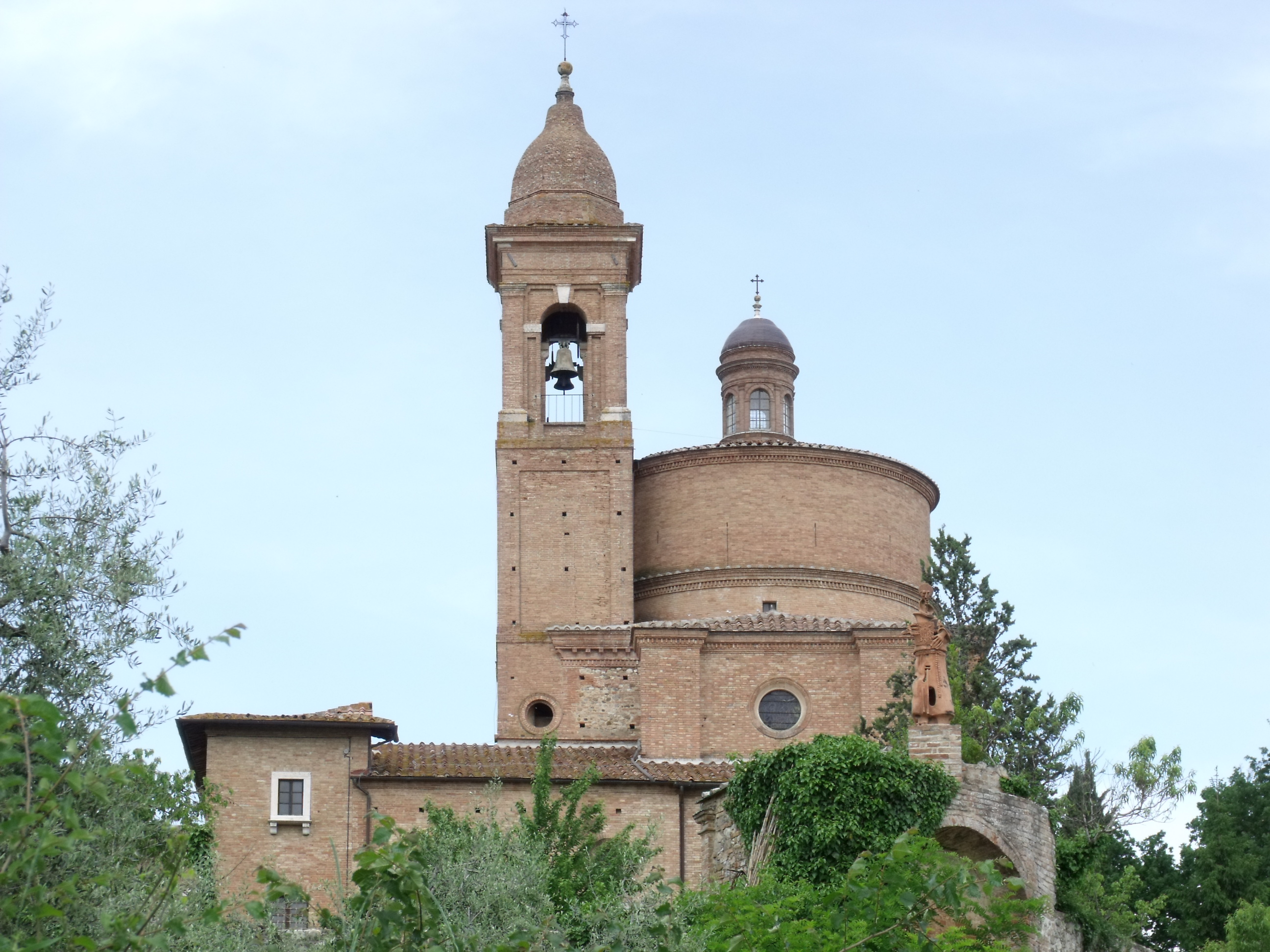 Basilica dell’Osservanza, Siena, von Süden fotografiert, Campanile, Kuppel und alter Eingang, von Süden fotografiert